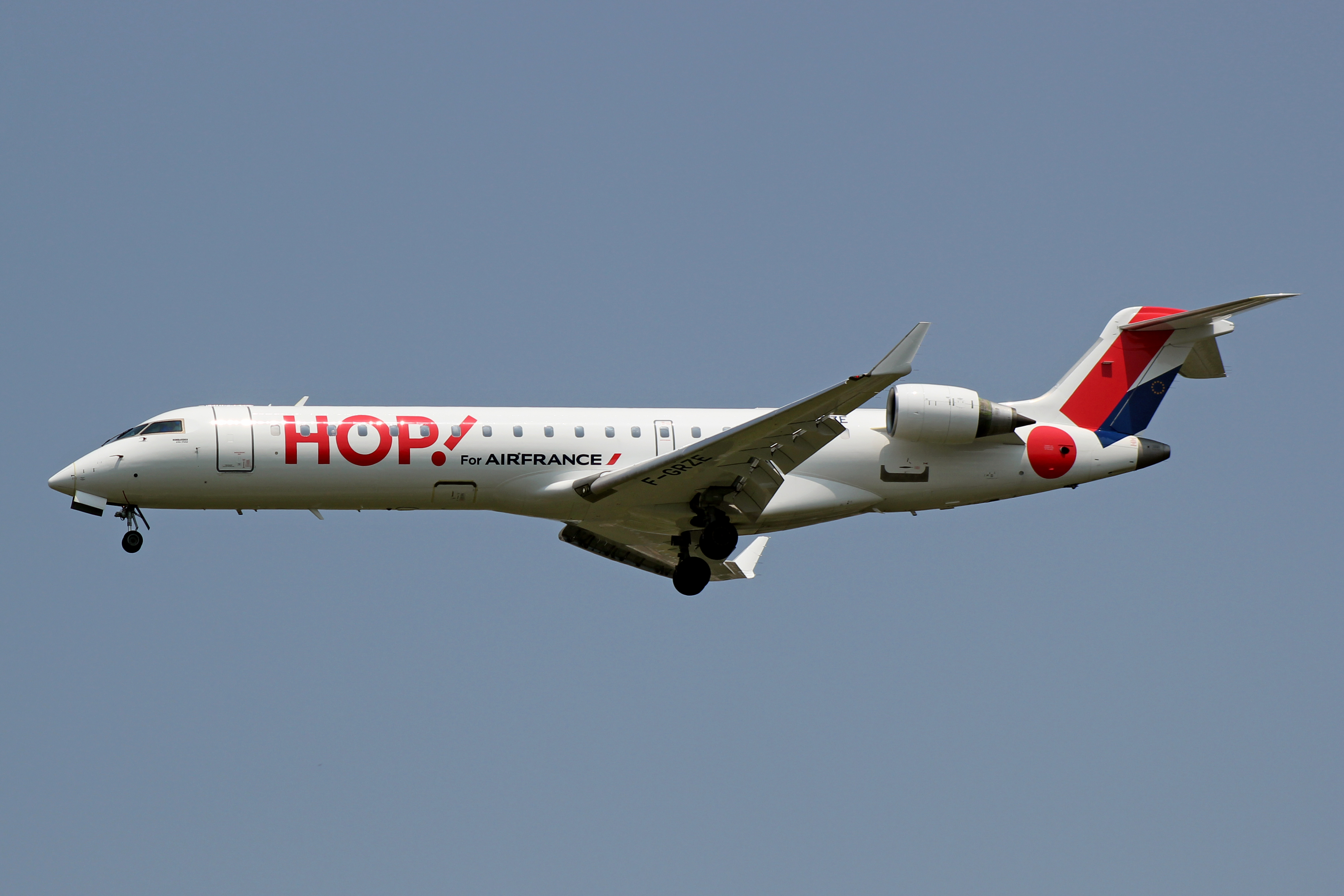 Bombardier CRJ700/900/1000 de HOP! aterrando no aeroporto de Bilbao.